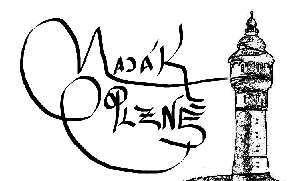 Logo Majáku Plzně